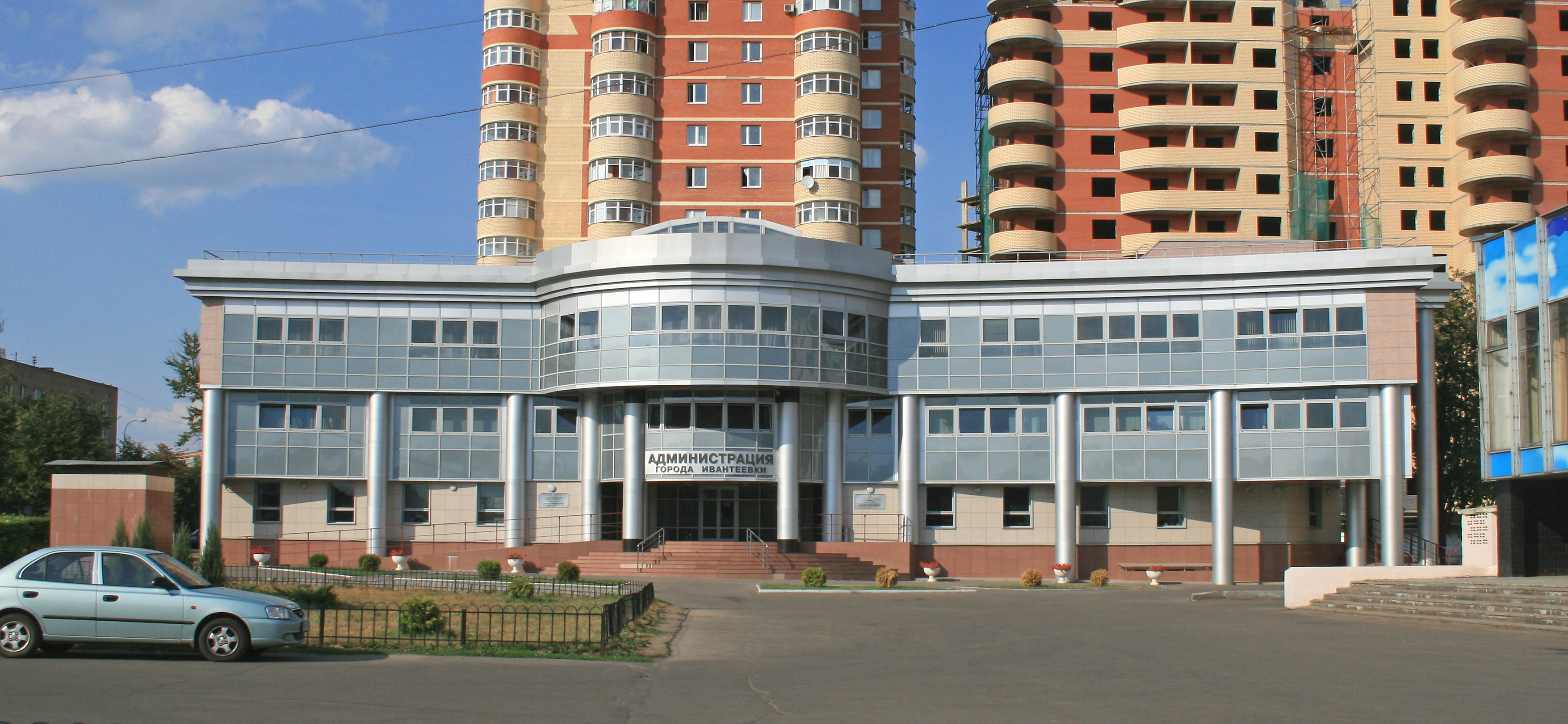 Здание администрации города Ивантеевки.